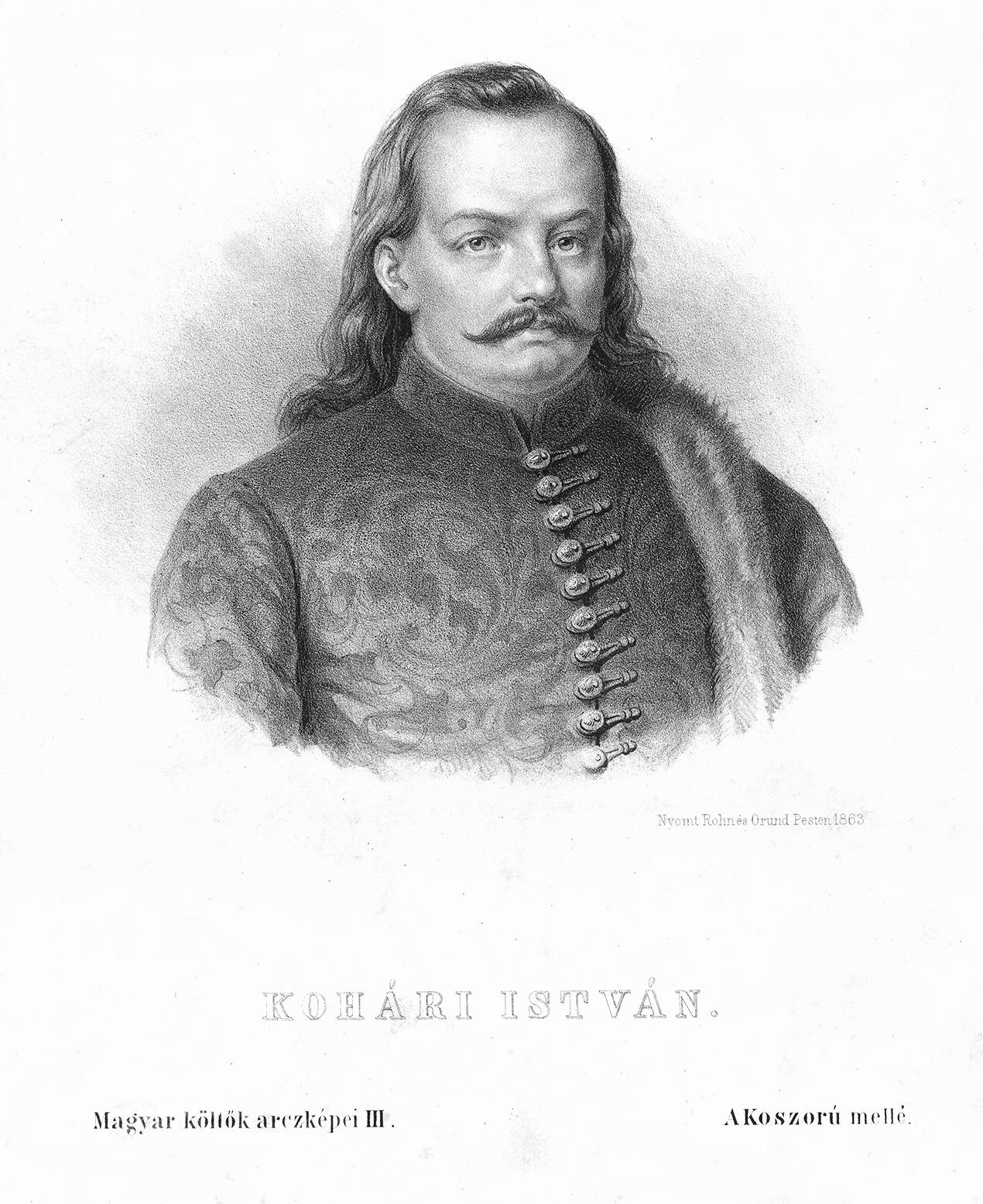 csábrághi és szitnyai gróf (korábban báró) Koháry István (Csábrág, 1649. március 12. – uo. 1731. március 29.) országbíró, hadvezér, politikus, költő.